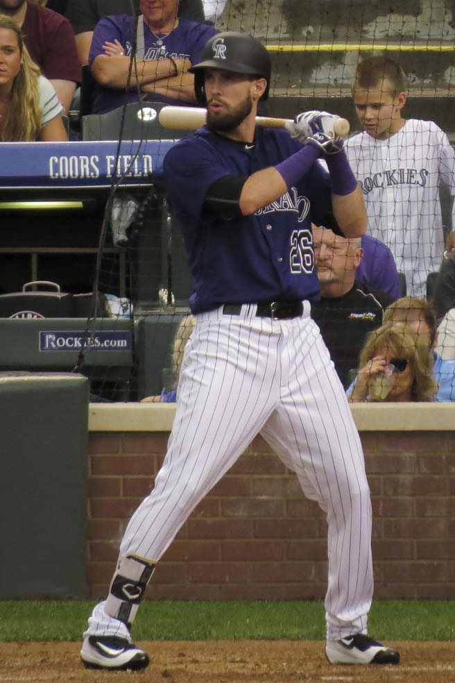 David Dahl